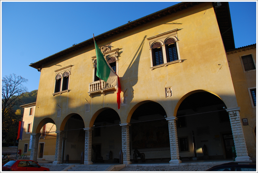 Vittorio Veneto, Museo della Vittoria